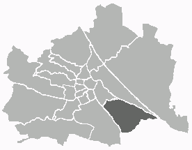 Positionskarte des 11. Wiener Gemeindebezirks Unter Verwendung einer Vorlage von Extrawurst. Public Domain.